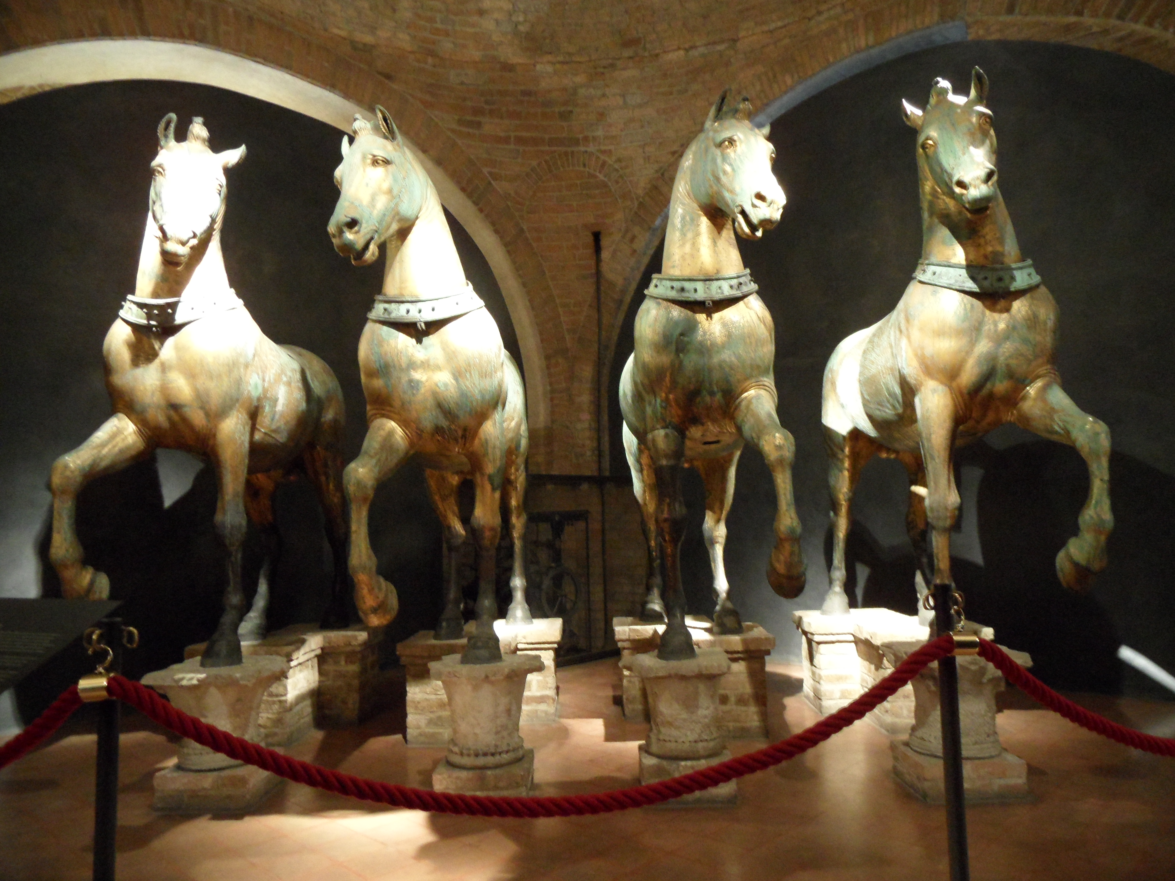 Cavalli originali di bronzo della basilica di S.Marco, Venezia